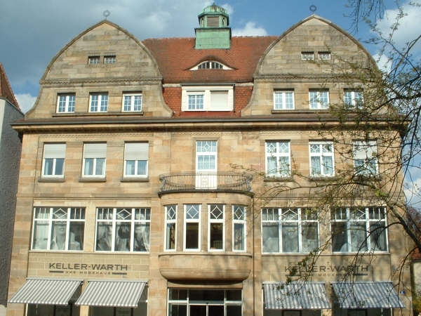 Former department store Einstein, Laupheim; 2007